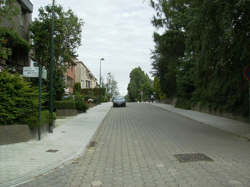 Av Mésanges Auderghem Belgium